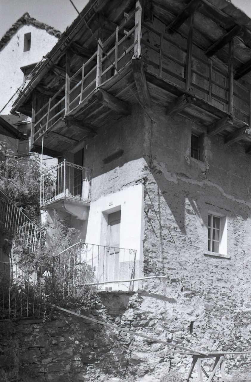 Servizio fotografico : Ornavasso, 1980 / Paolo Monti. - Strisce: 4, Fotogrammi complessivi: 13 : Negativo b/n, gelatina bromuro d'argento/ pellicola ; 35 mm. - ((Sul portanegativi: N[I]KM[AT]-EL FP4 e iscrizione: "Miggiandone [sic] 18-30/ Fond. Enr. Monti". - La serie è identificata da Monti con segni grafici e distinta dalla precedente. - Confronta scheda 3975Lpbn18-30. - Occasione: Documentazione per la pubblicazione: Rizzi Enrico, "Walser: gli uomini della montagna", Valstrona, Lo Strona, 1981 (su ordinazione del Signor Enrico Rizzi). - Fonte: Fattura di Paolo Monti: IV. Commesse/ Fattura n. 34/ Riprese fotografiche eseguite nella regione dei Walser (1981/10/08), presso Archivio Paolo Monti. N. 195 foto formato 24x30 o 20x24. - Fonte: Monografia di Rizzi, Enrico: Walser: gli uomini della montagna, Valstrona, Lo Strona (1981)